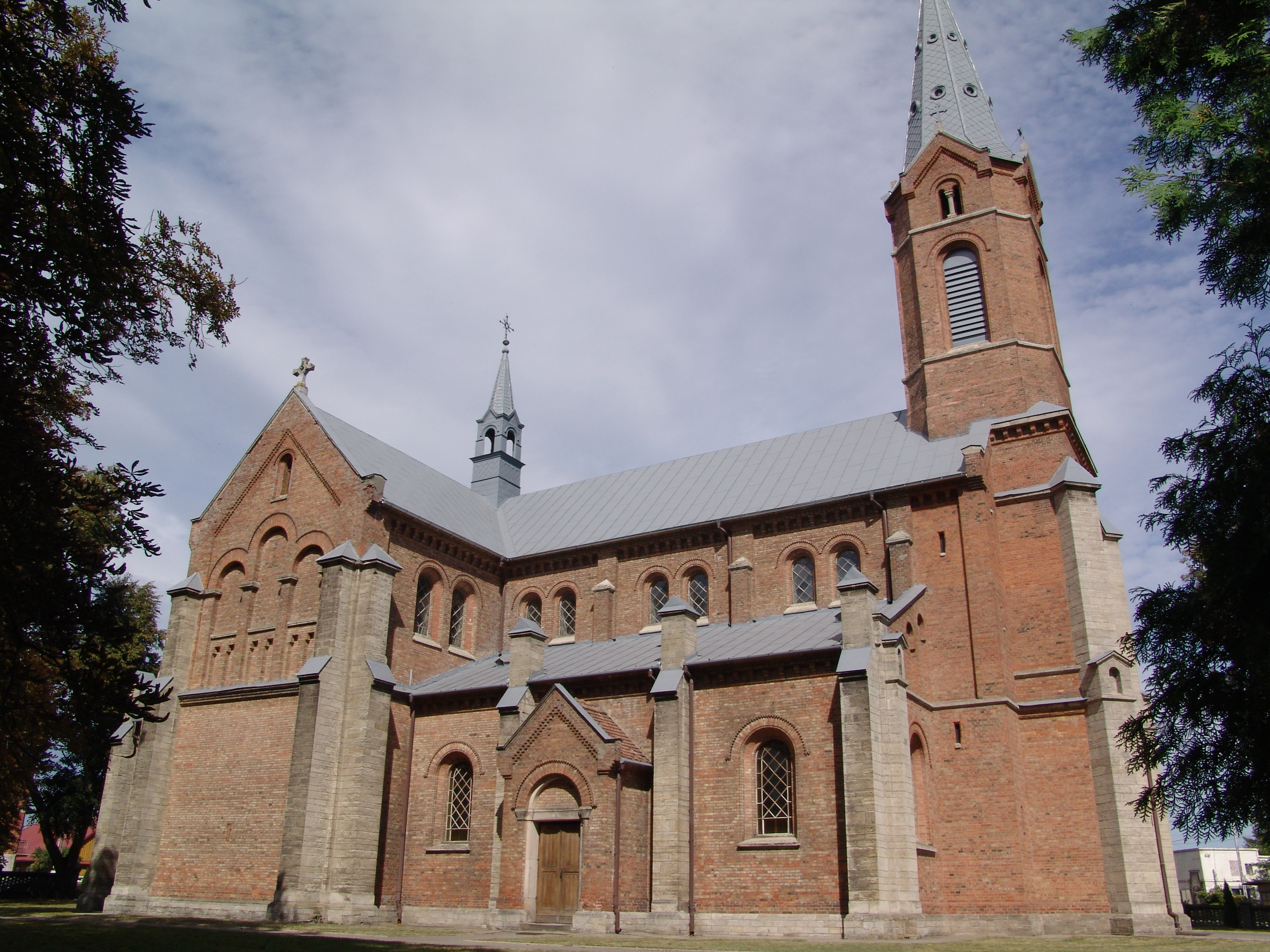 Połaniec - kościół par. p.w. św. Marcina (widok od zachodniej strony)